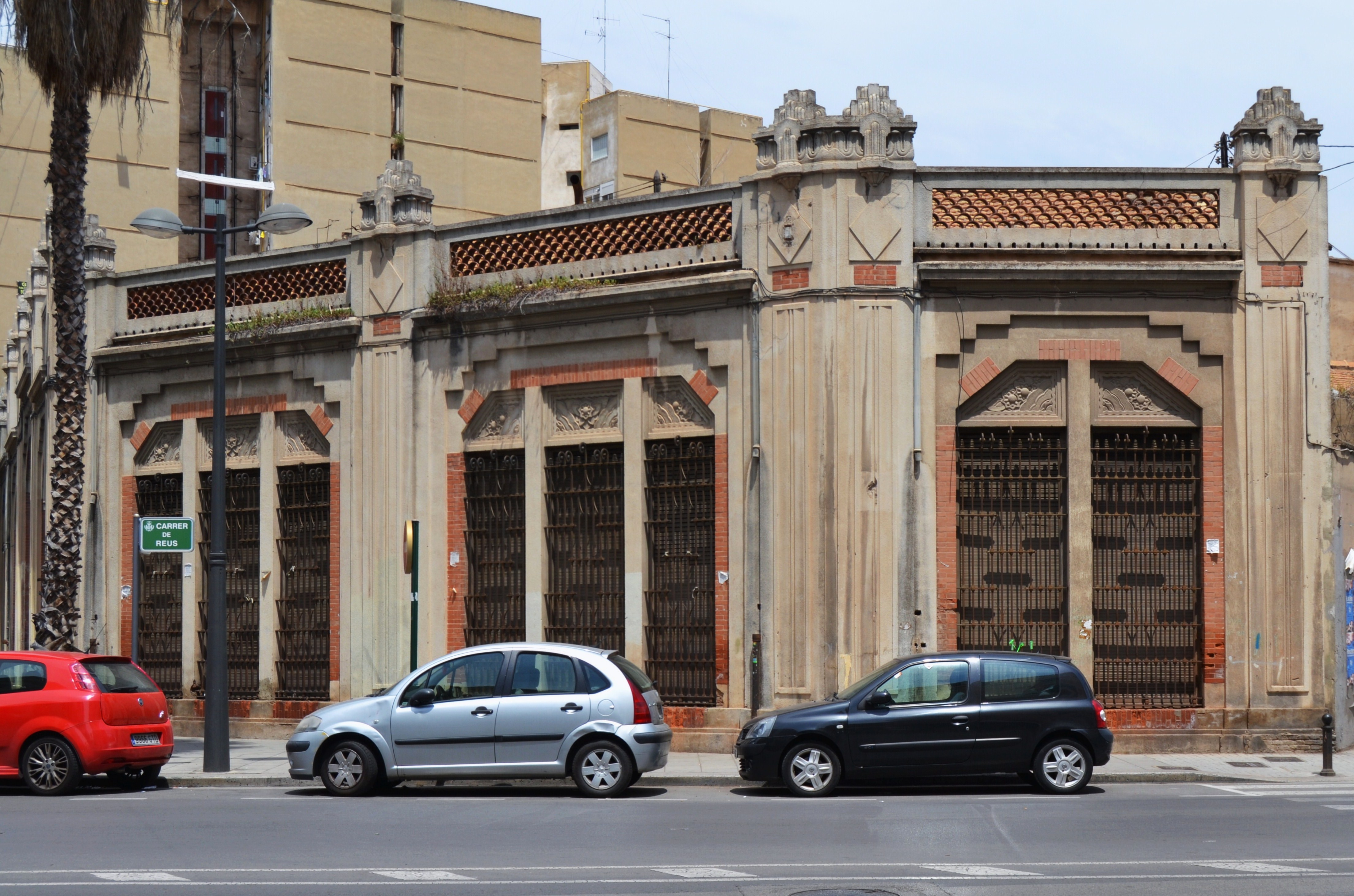 Fàbrica de Bombes Gens, lateral.